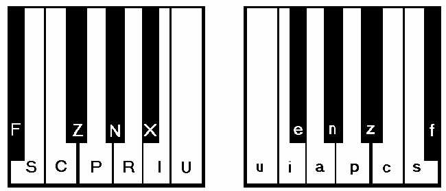 pamz, opera propria, tastiera macchina Michela con rappresentazione dei tasti, GFDL